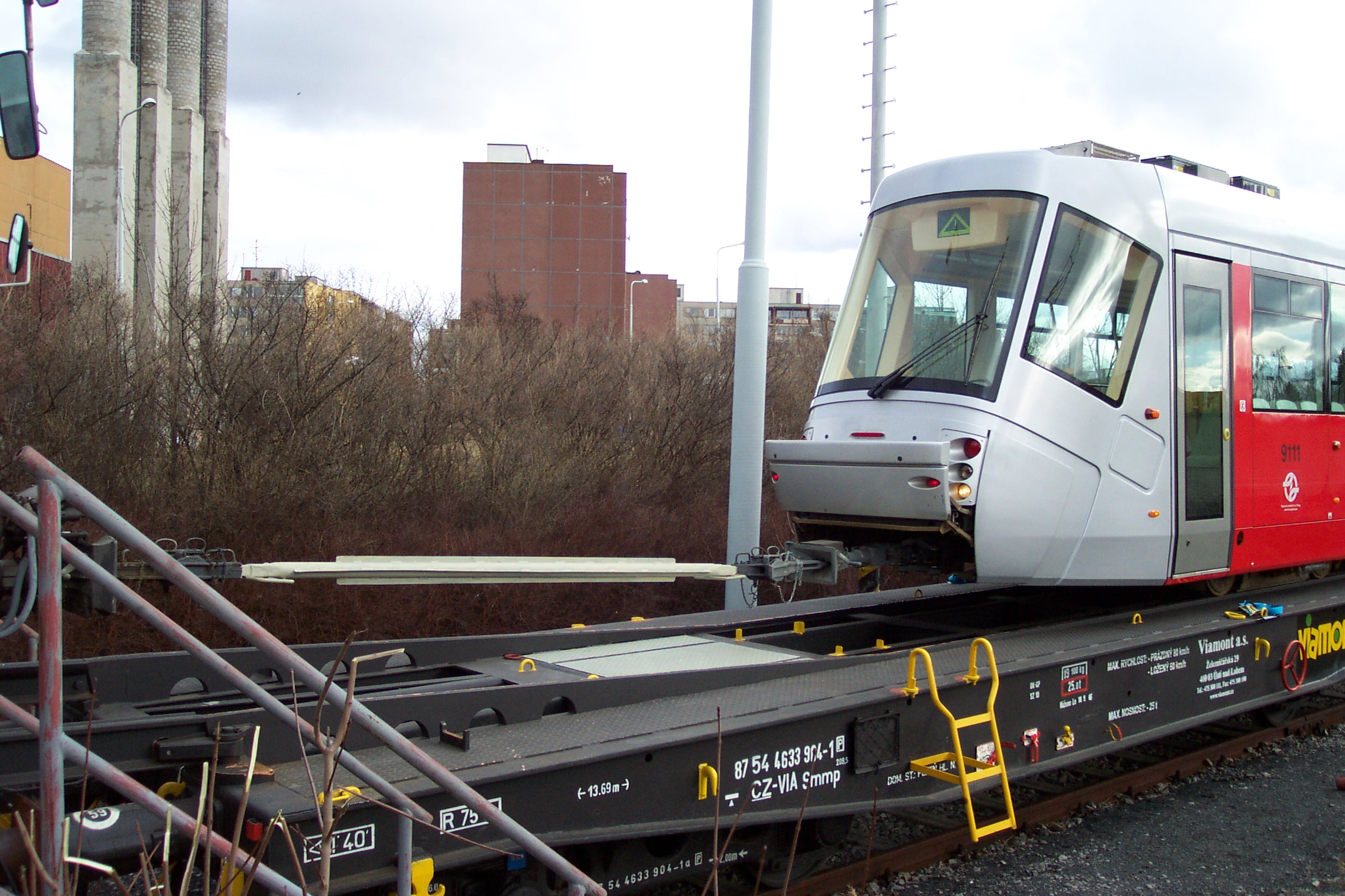 Loading the tram type Škoda 14T on the special rail car in Prague - Praha, nakládání tramvaje typu Škoda 14T na speciální železniční vagon